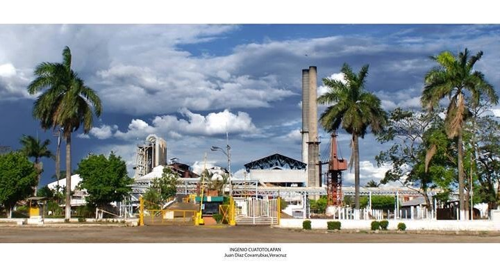 Vista desde el ingenio de cuatotolapan